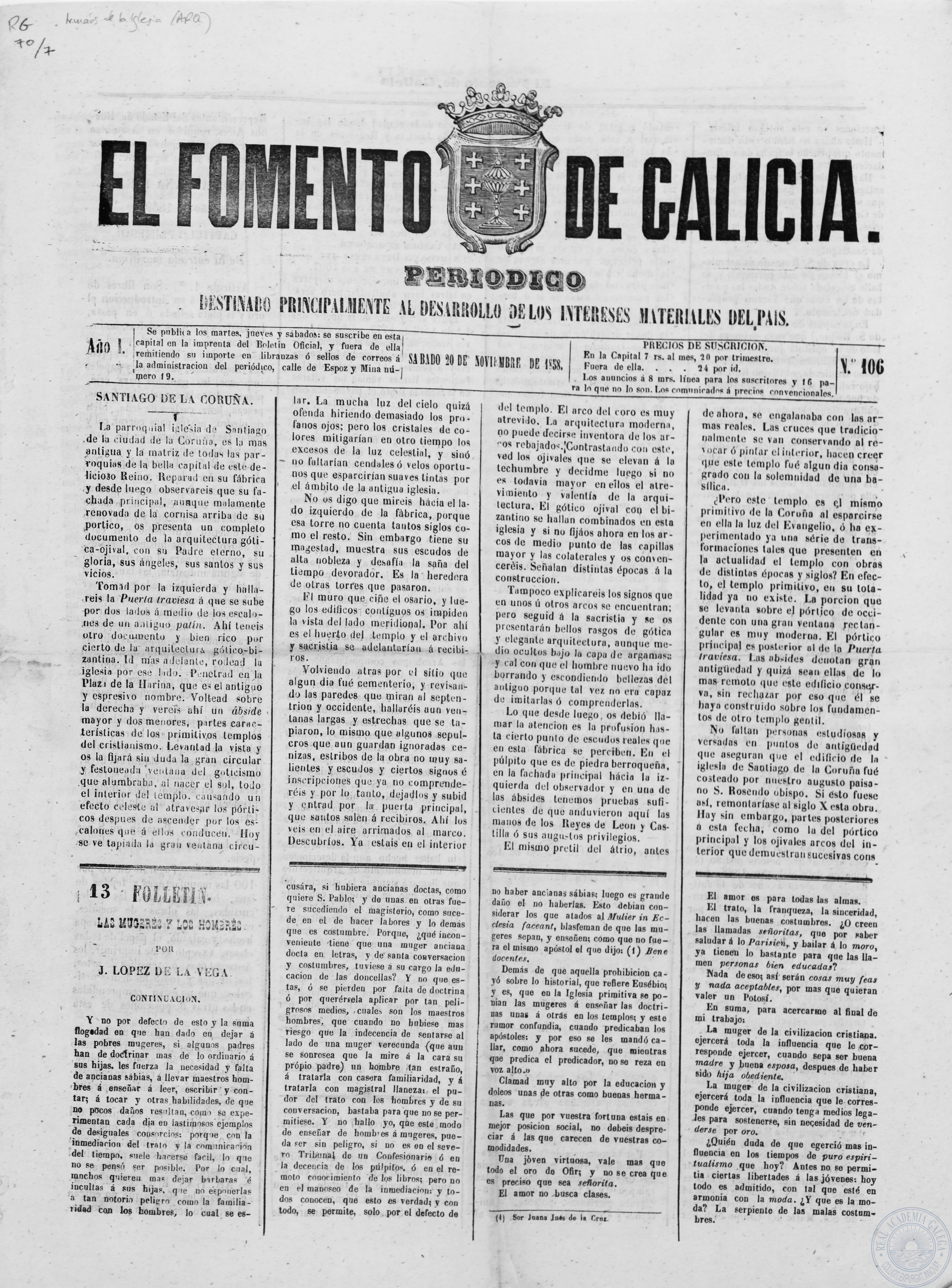 Número 106 de El Fomento de Galicia: periódico destinado principalmente al desarrollo de los intereses materiales del país.